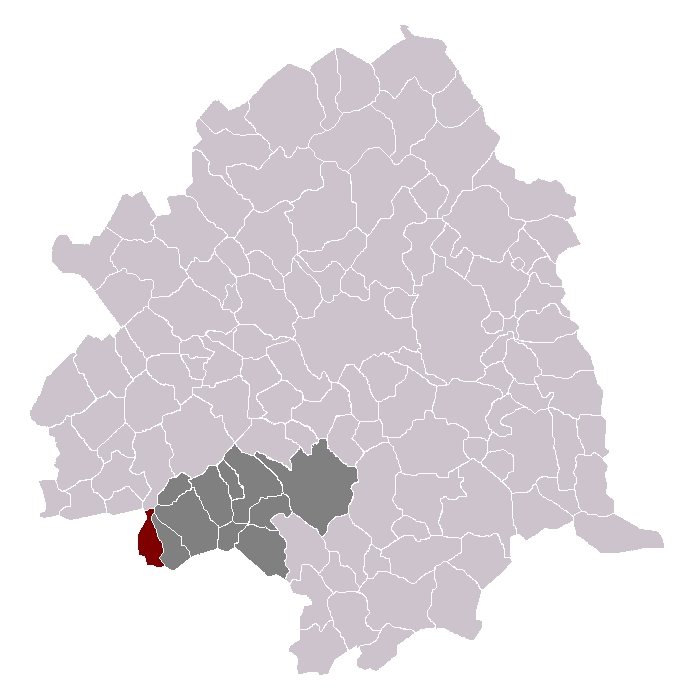 Bauvin dans son canton et son arrondissement